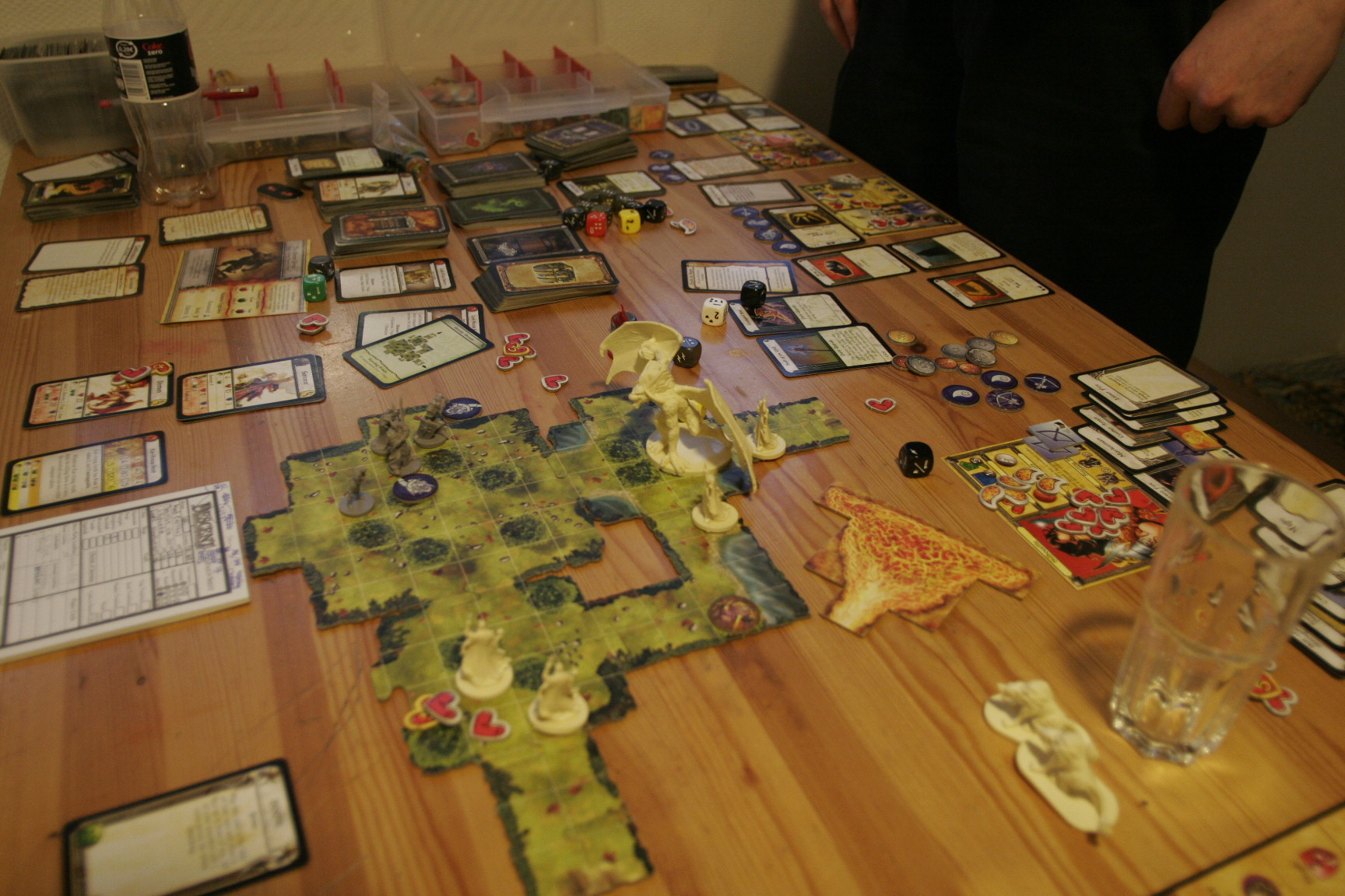 Descent-lautapeli }